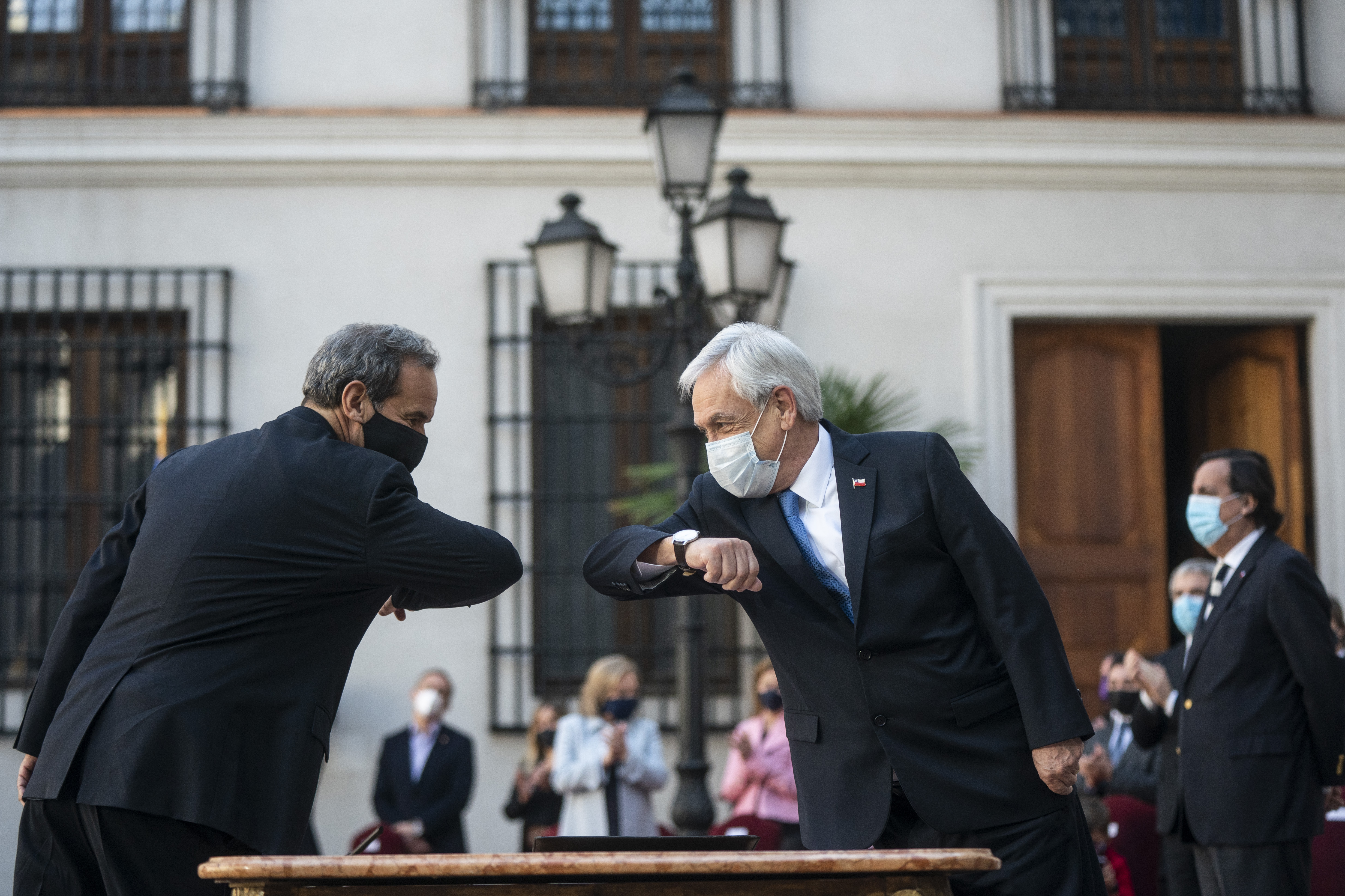 El presidente Sebastián Piñera saluda a Andrés Allamand tras ser nombrado Ministro de Relaciones Exteriores de Chile.